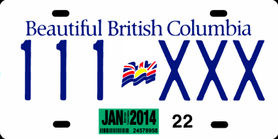 Схематичне зображення номерного знаку